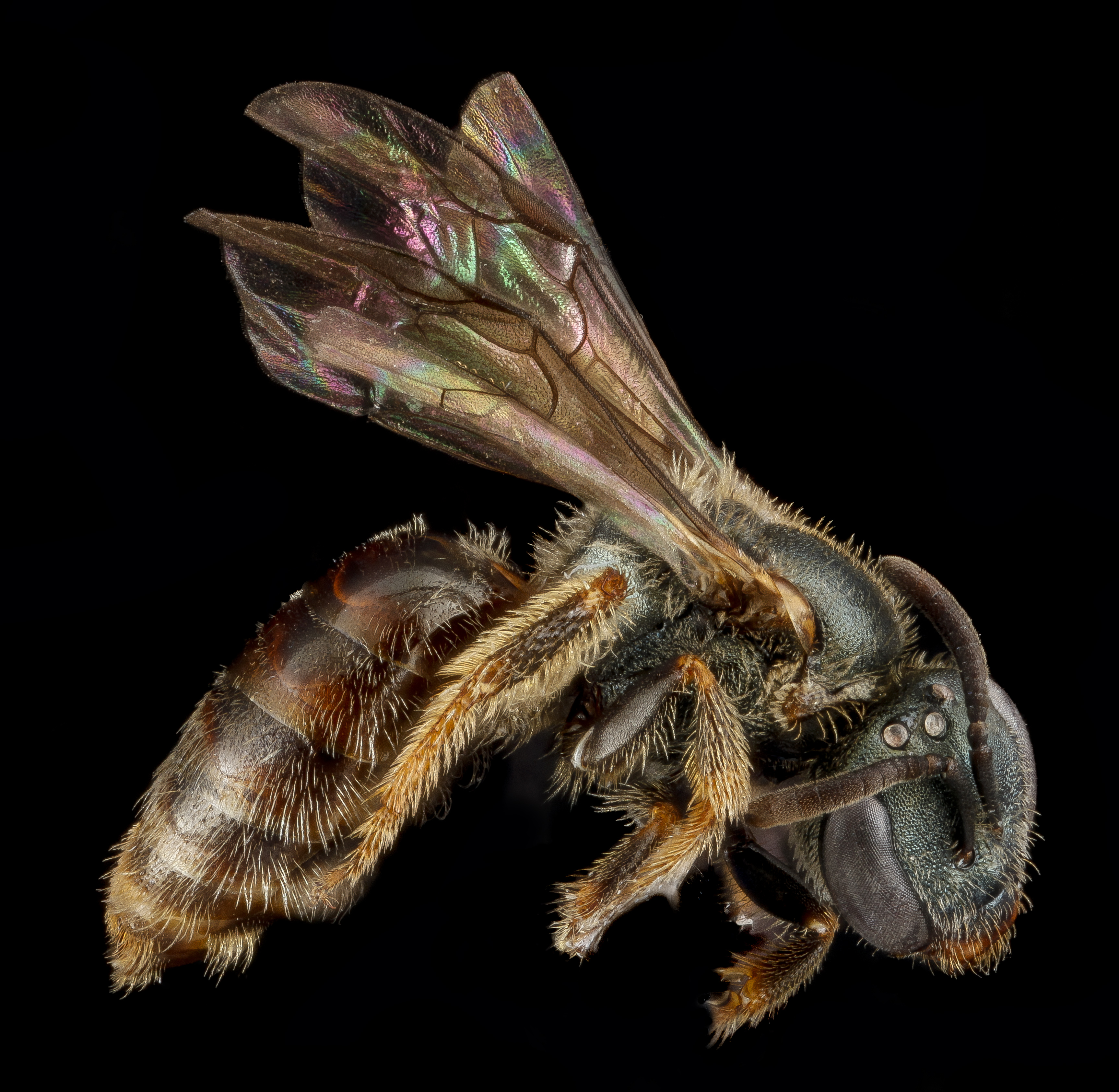 Lasioglossum surianae, male, Florida Miami-Dade County